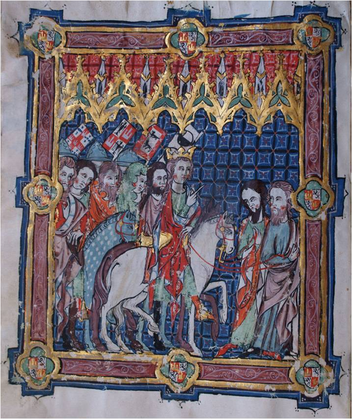 Alfonso XI y sus nobles. Miniatura del Libro de la Coronación de los Reyes de Castilla, realizado en el siglo XIV y conservado actualmente en la Real Biblioteca de San Lorenzo de El Escorial, (España).